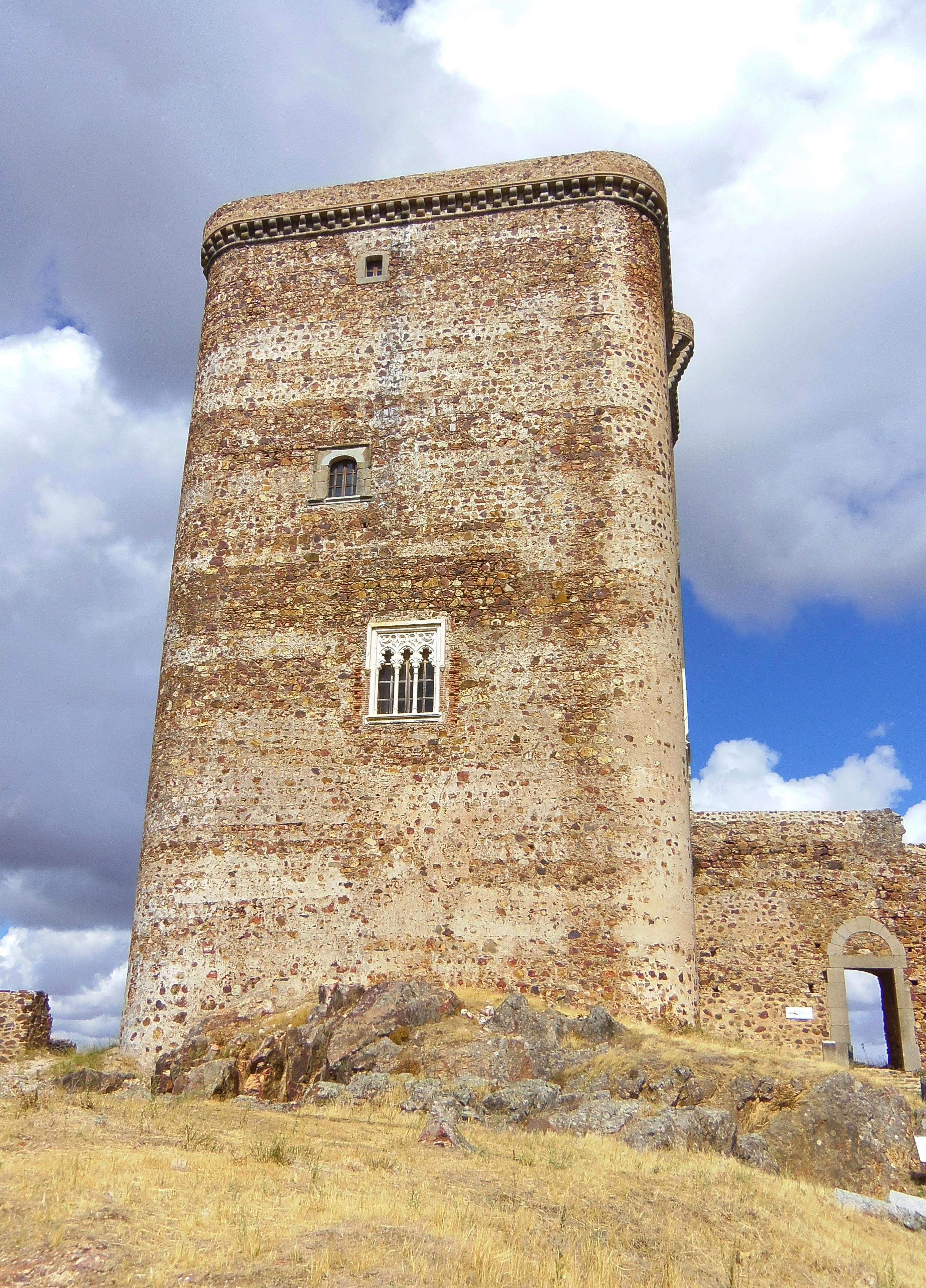 Torre del homenaje vista del interior del patio de armas.